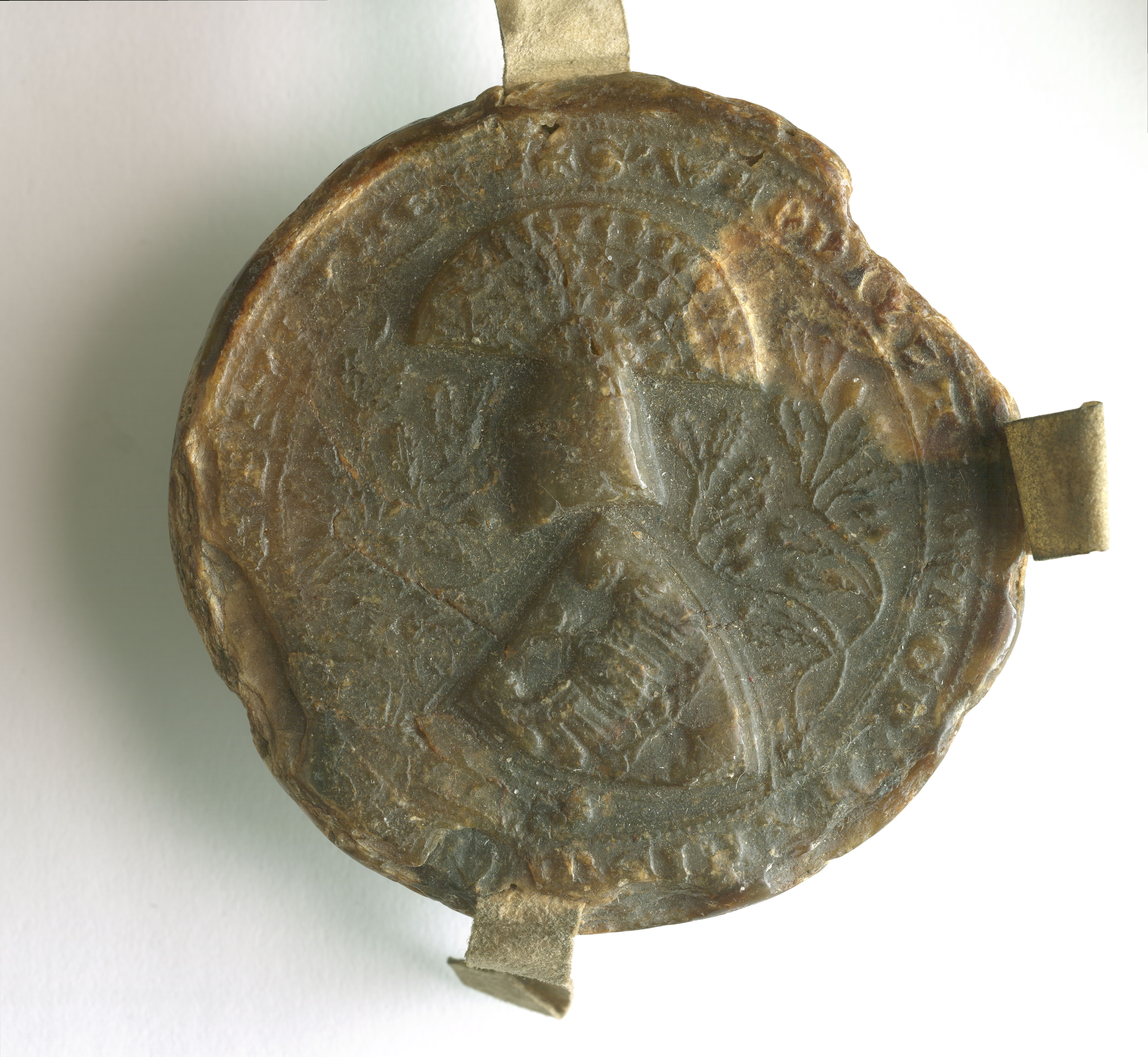 Pieczęć Władysława, ks. bytomskiego. Pieczęć odciśnięta w naturalnym wosku, otok uszkodzony, na pasku; średnica: 7,5 cm. W polu pieczęci pochylona tarcza z orłem a nad nia hełm z wachlarzem z pawich piór. Jako tło gałązki roślinne. Legenda: + S WLODIZLAI DEI GR[A DVCIS COSLEN] SIS ET BIVTVMEN.